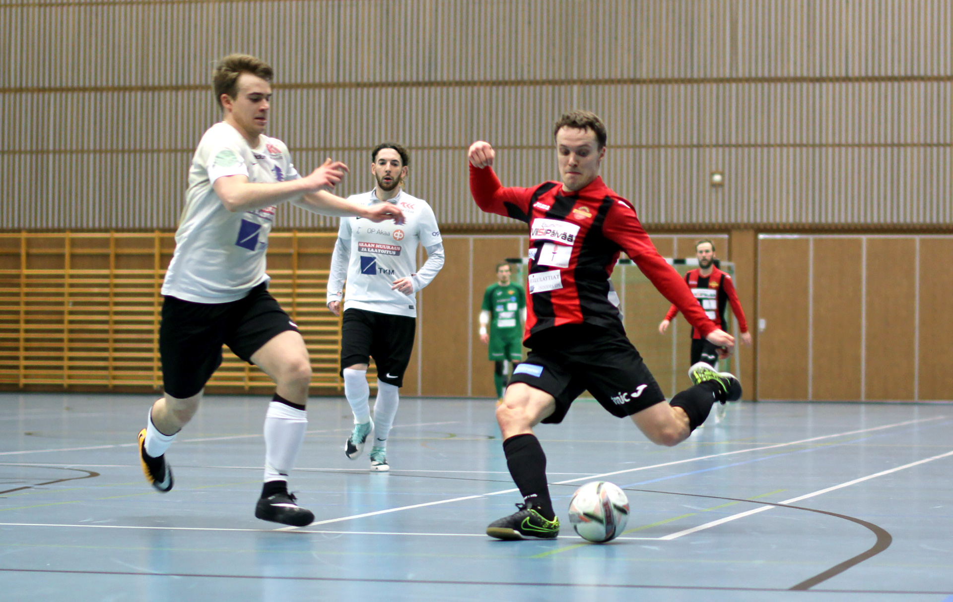 Jukka Kytölä kaudella 2017-18 finaalisarjan ottelussa Leijona Futsalia vastaan.